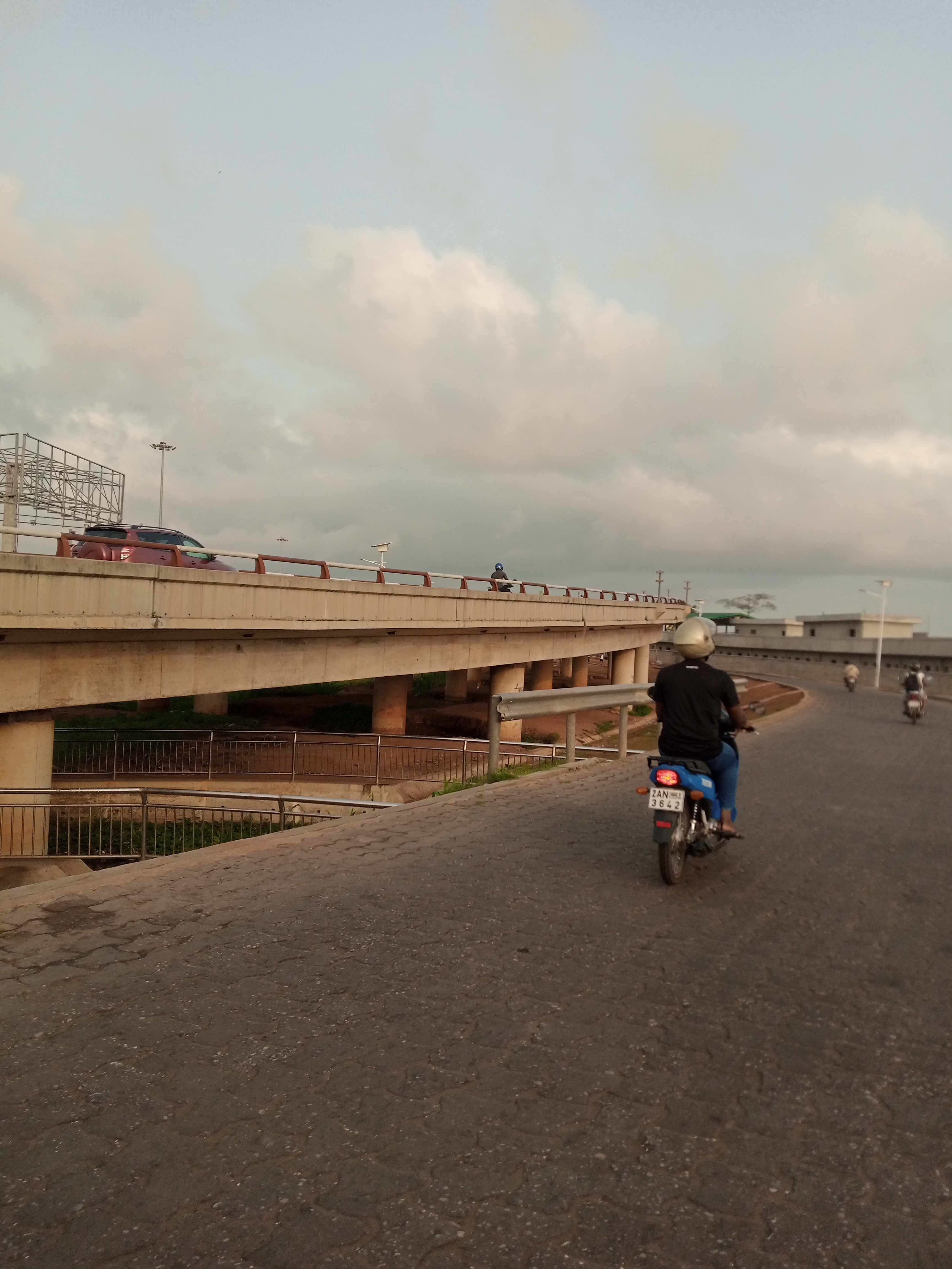 échangeur de Godomey au Bénin This is an image with the theme "Africa on the Move or Transport" from: Benin